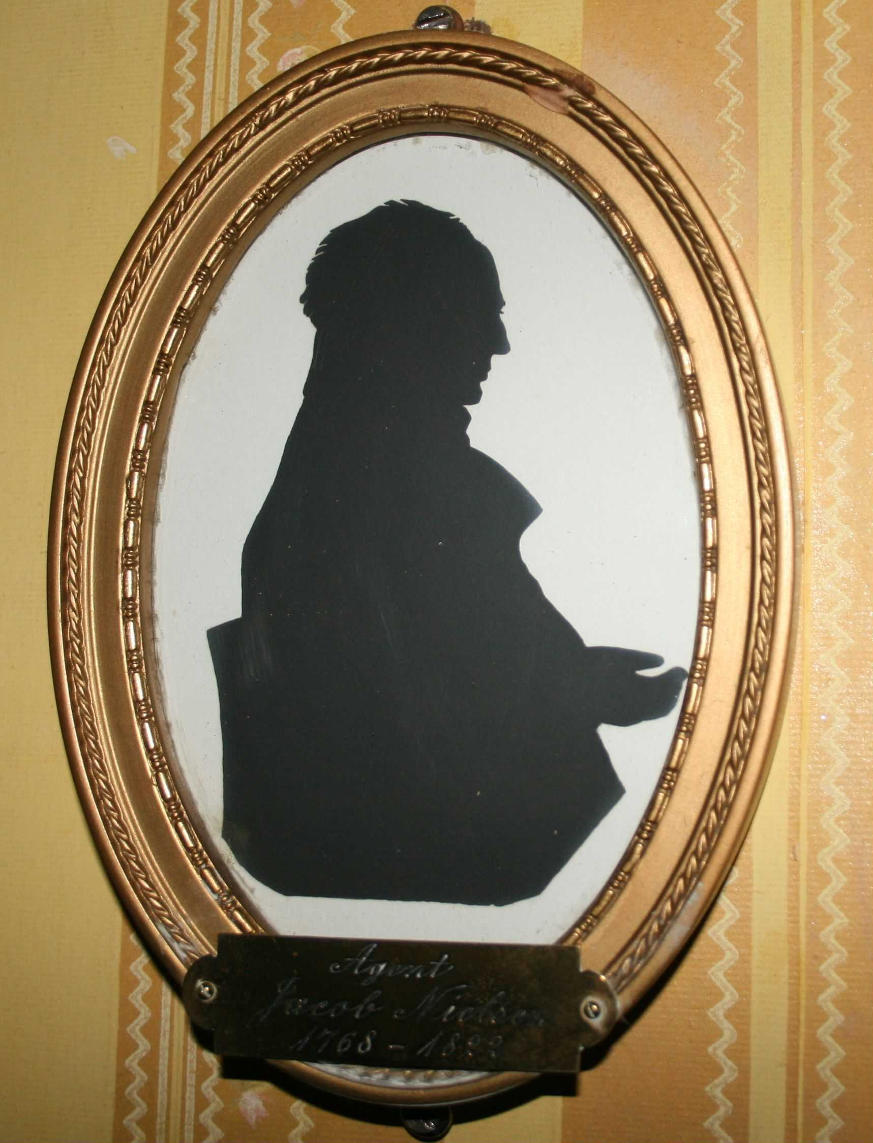 Silhuett av Jacob Nielsen (1768-1822). Profil mot høyre. Jacob Nielsen deltok på notabelmøtet 16.feb 1814. Fra Selskapet til Eidsvoldsbygningens Udstyr. Selskapet ble opprettet 1895 og nedlagt i 1918, og samlet inn gjenstander og inventar til Eidsvollsbygningen til grunnlovsjubileet i 1914.